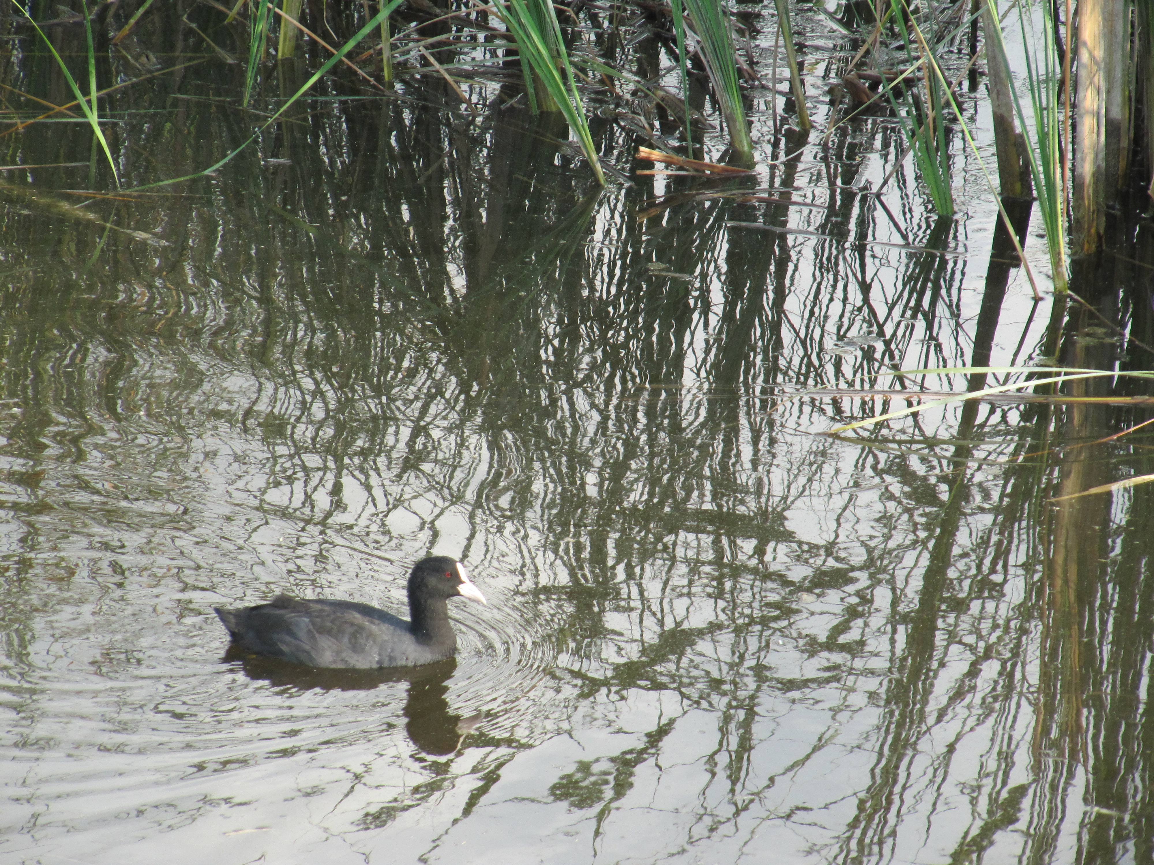 Фауна